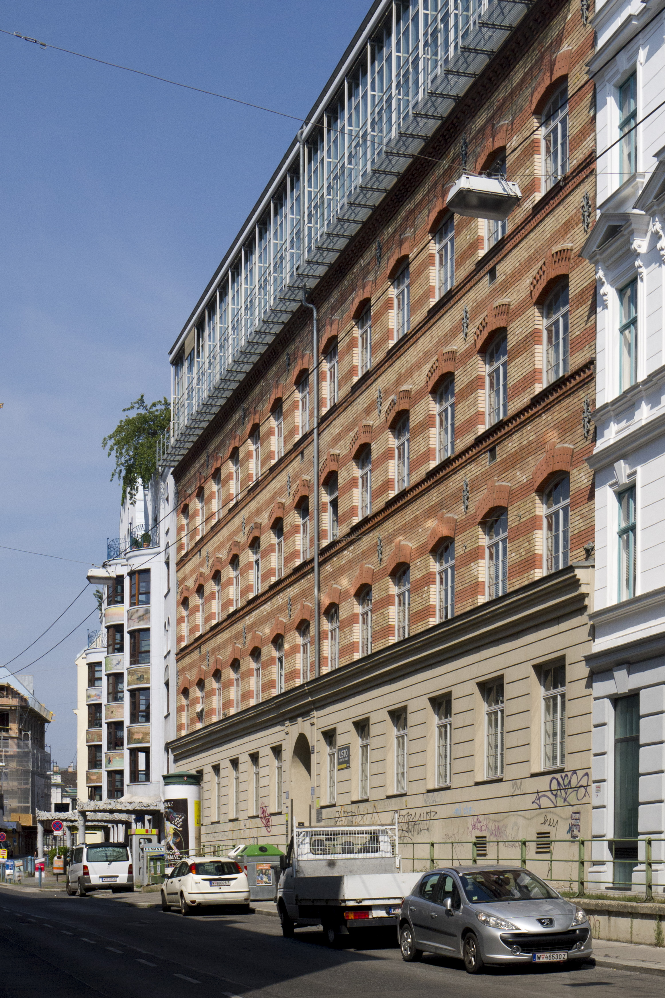 Miethaus, Fabriksgebäude, Listo-Film